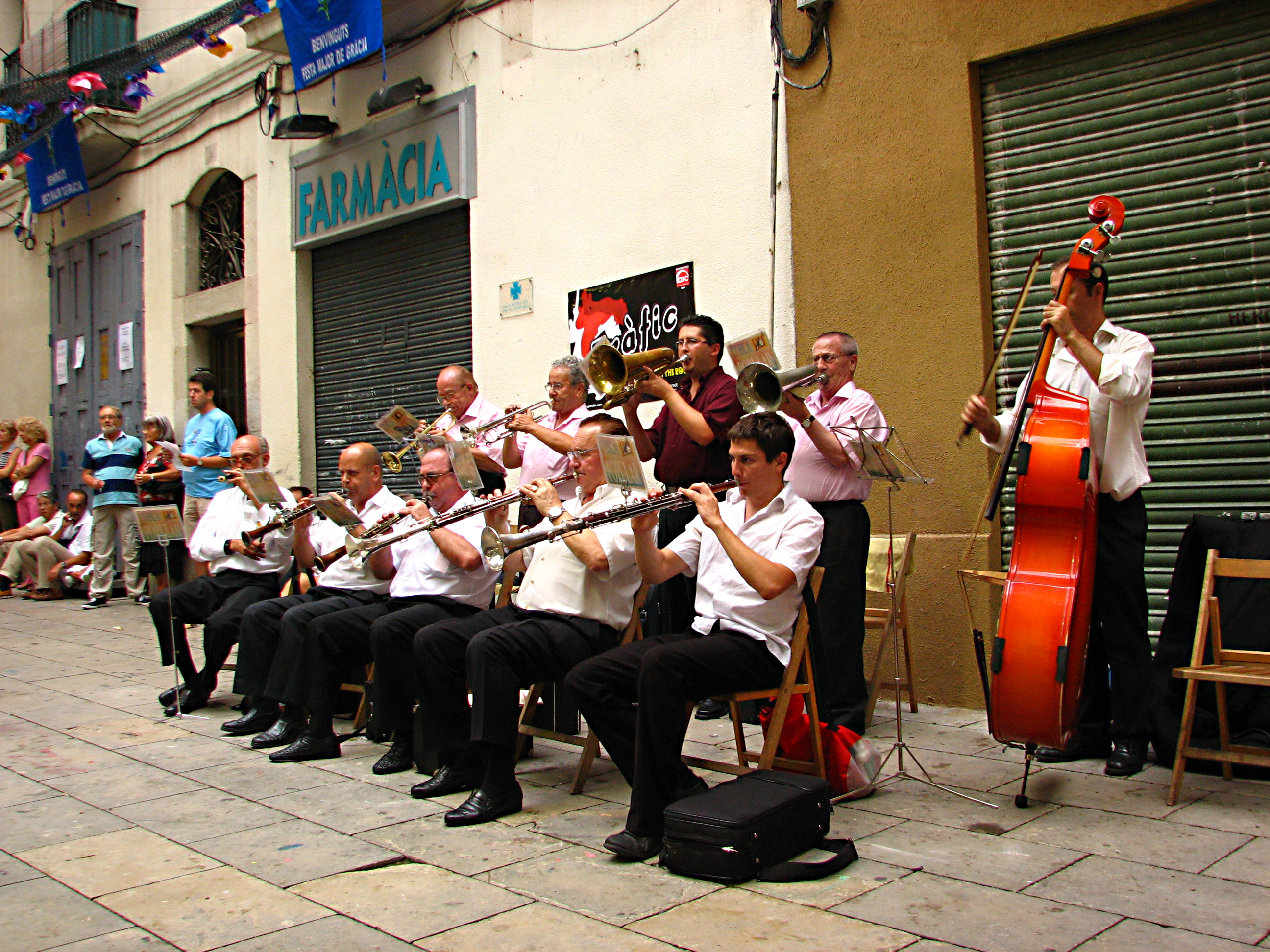 Cobla Popular a les festes de Gracia (Barcelona per Donot.